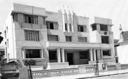 Casa D´Itália de Bello Horizonte, construída em 1935, na Rua Tamóios, 341, quase esquina com São Paulo e Av. Amazonas, depois de tomada pelo governo brasileiro, foi utilizada como Assembléia Legislativa e por muito tempo como Cãmara municipal de Belo Horizonte. Foi demolida e em seu lugar surgiu um hotel. Em seu acervo confiscado muitos documentos, fotos, registros e obras de arte desapareceram, junto com outros objetos. Durante o ano de 1942 muitos atentados foram cometidos contra a Casa Di Itália, com depredações e incêndios, que, segundo representantes do órgão reaberto em 1998, serviram de justificativas para o sumiço do valioso e histórico material. ( APN- Arquivo Público- Hemeroteca da Biblioteca Pública- Arquivo pessoal de Marina Molinnari-) ([1])